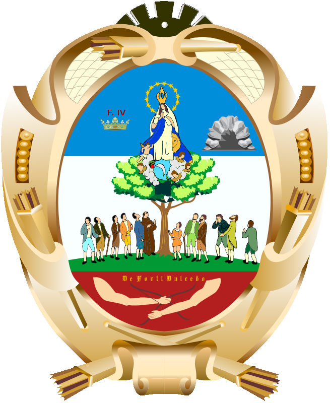 Escudo de Celaya